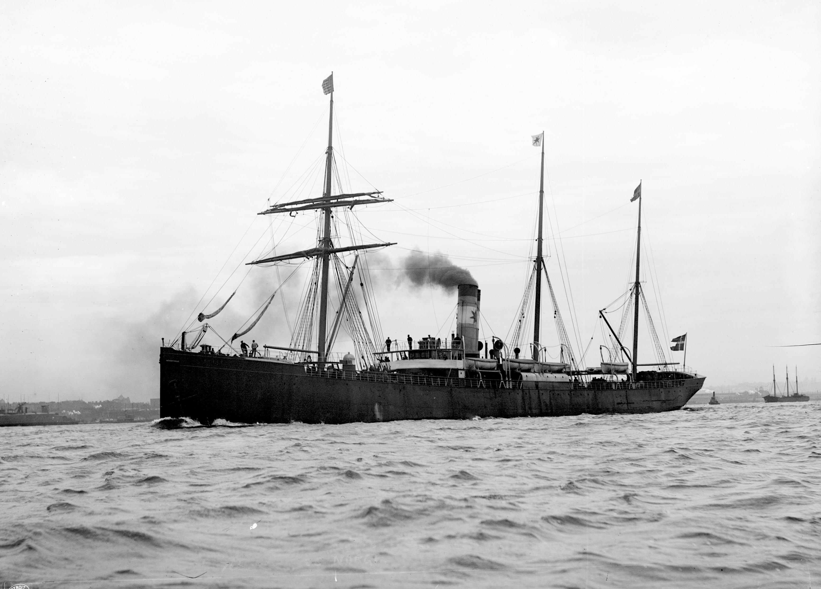 SS Norge